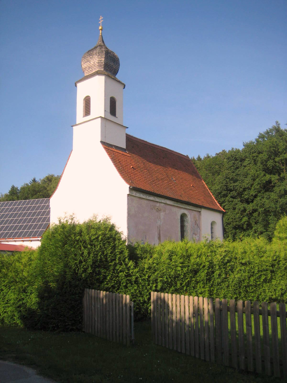 Diese Filialkirche ist apätgotisch und barock ausgebaut.